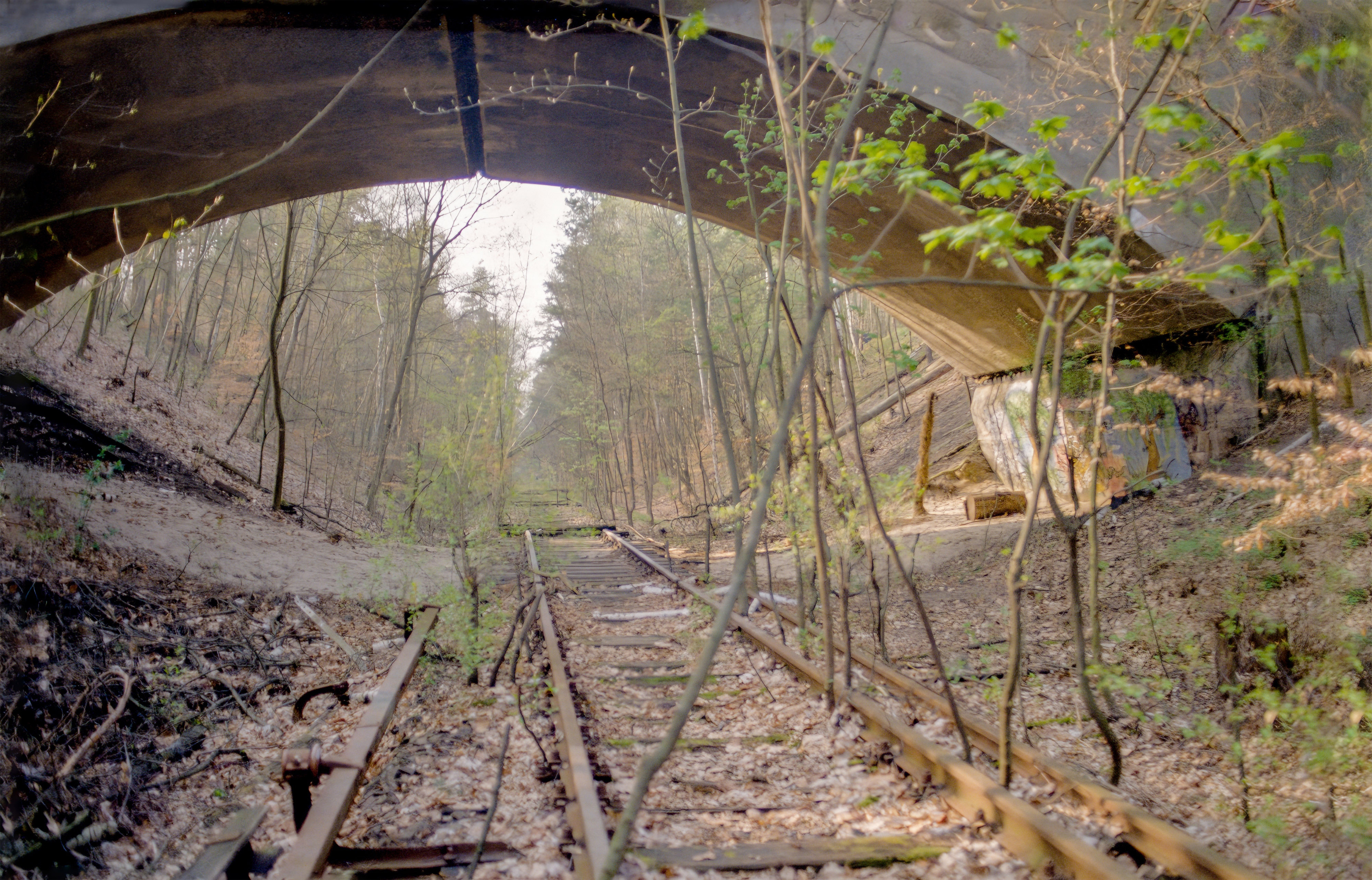 Historisches Kleinmachnow: Alte Friedhofsbahn-Trasse bei Dreilinden